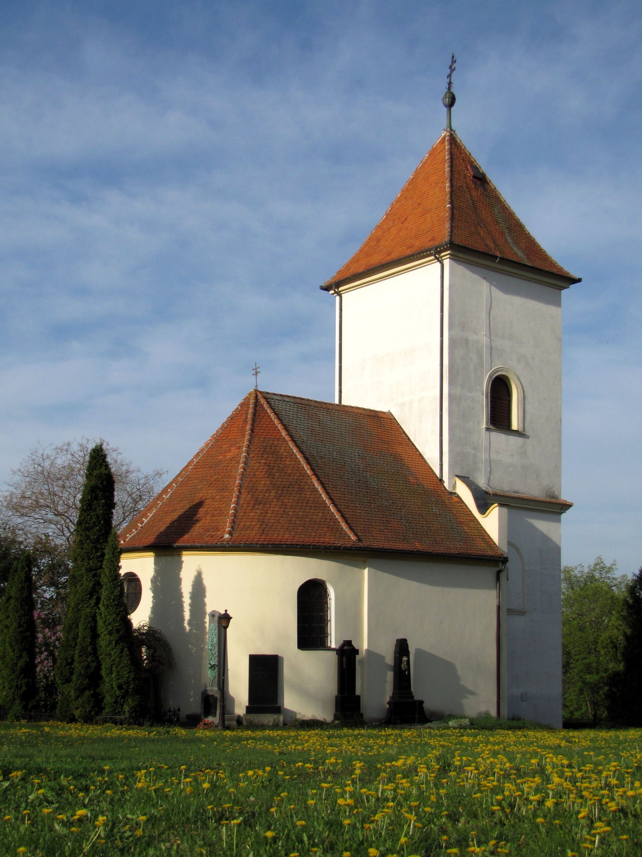 Kaple sv. Josefa, do roku 1786 farní kostel sv. Martina.